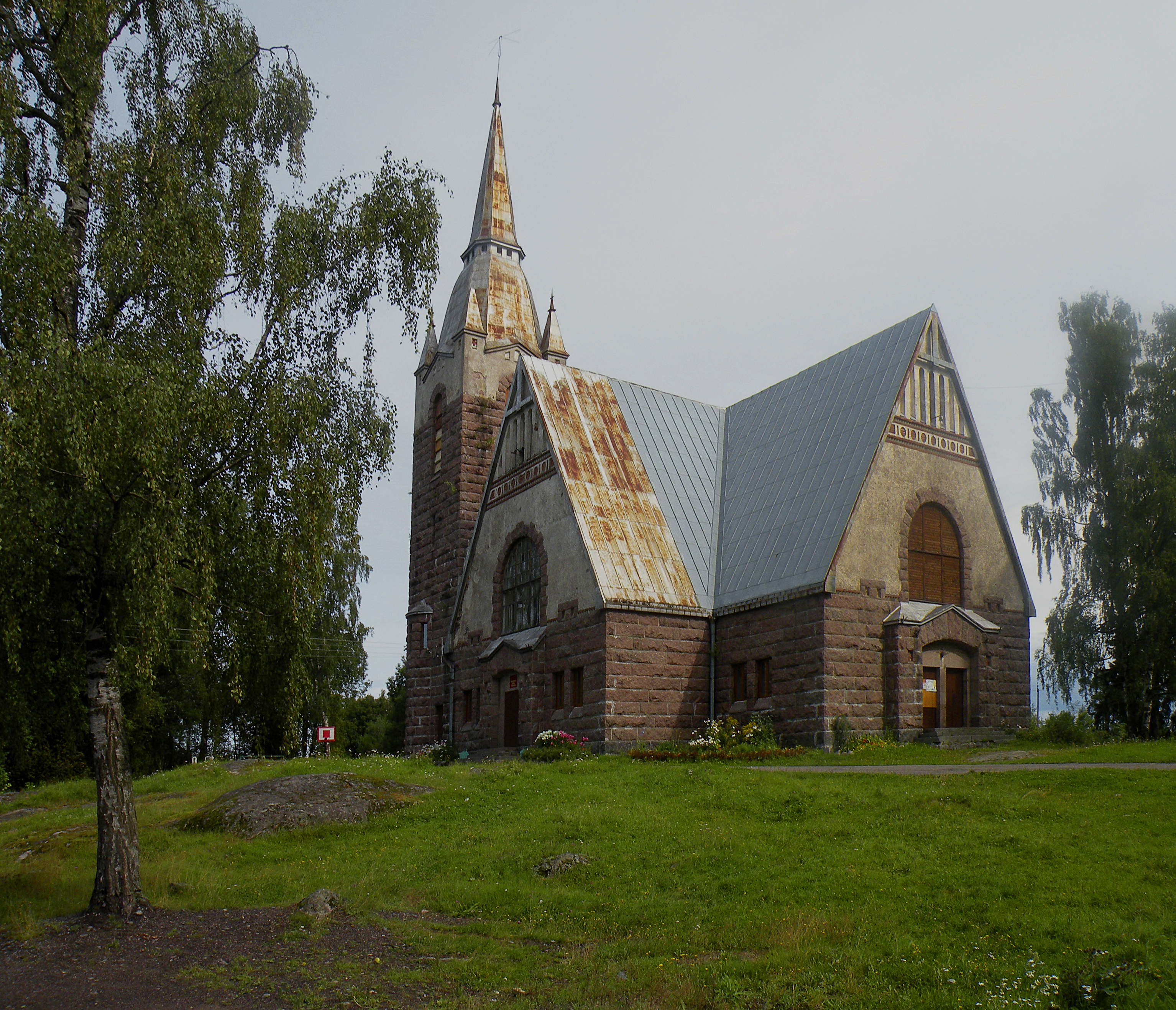 Кирха.Пос.Мельниково.Лен.обл.